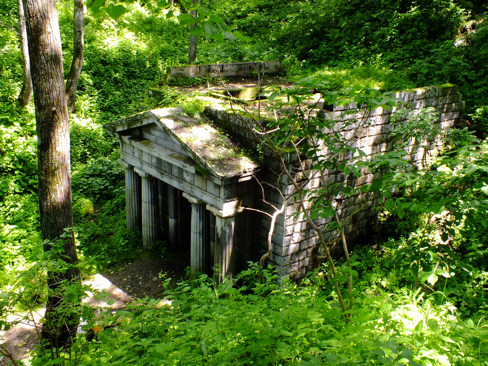 Склеп семьи Бринер (Приморский край, Владивосток, село Безверхово, берег бухты Нарва)